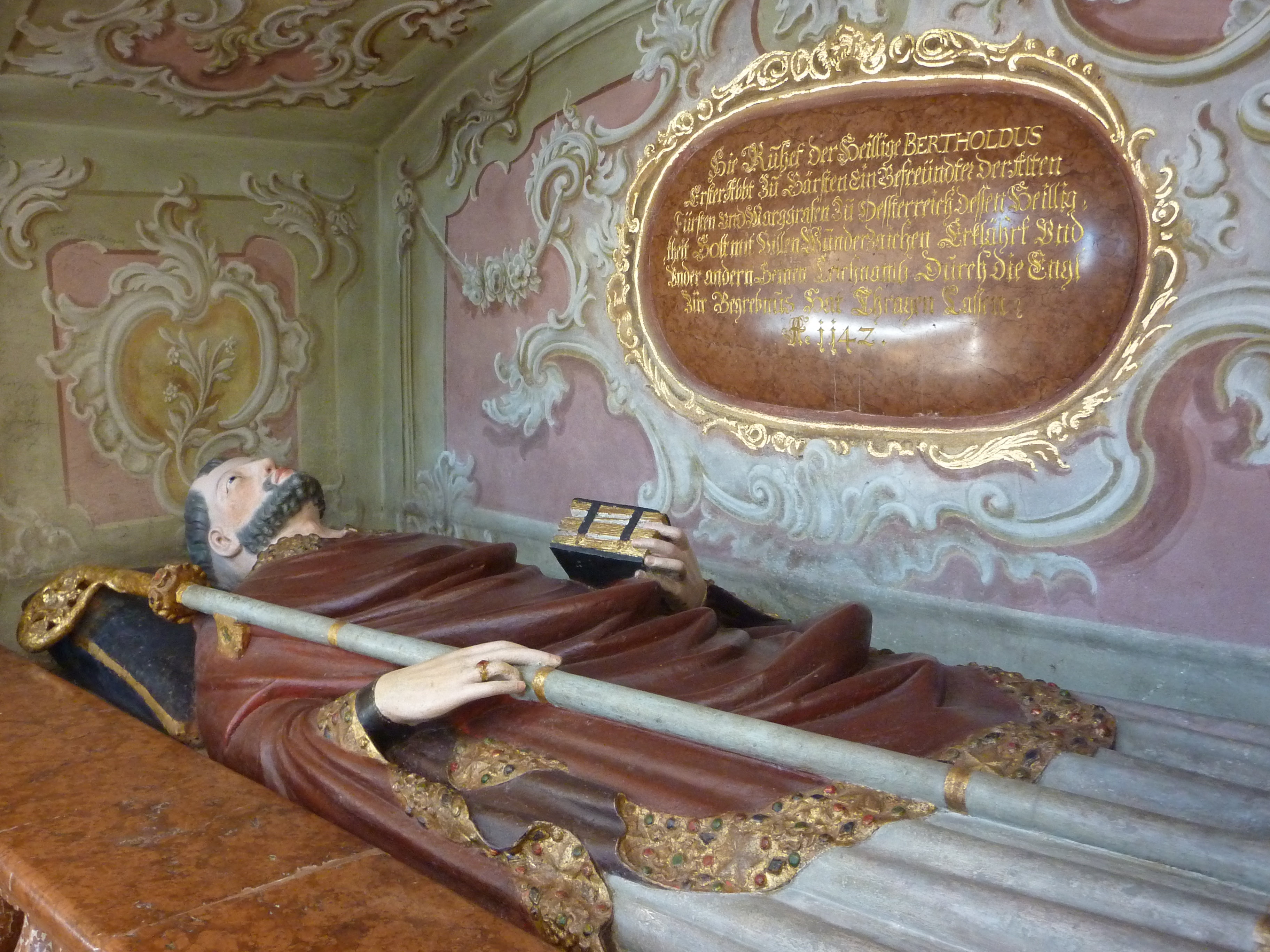 Kath. Pfarrkirche Mariä Himmelfahrt, ehem. Klosterkirche, Am Platzl, Garsten, Oberösterreich - Hochgrab des hl. Berthold in der ersten Seitenkapelle rechts